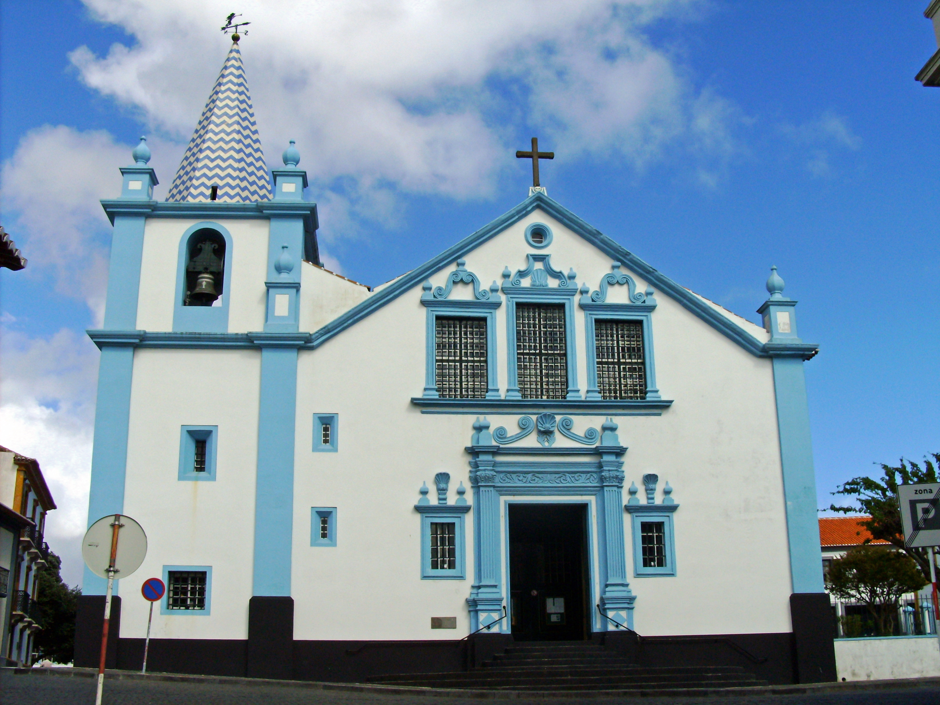 Igreja de Nossa Senhora da Conceição, Angra do Heroísmo, Ilha Terceira, Açores.